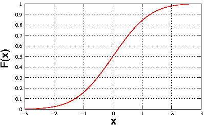 Titre : Fonction de répartition de la loi normale Auteur : Alexandre Vial License : domaine public